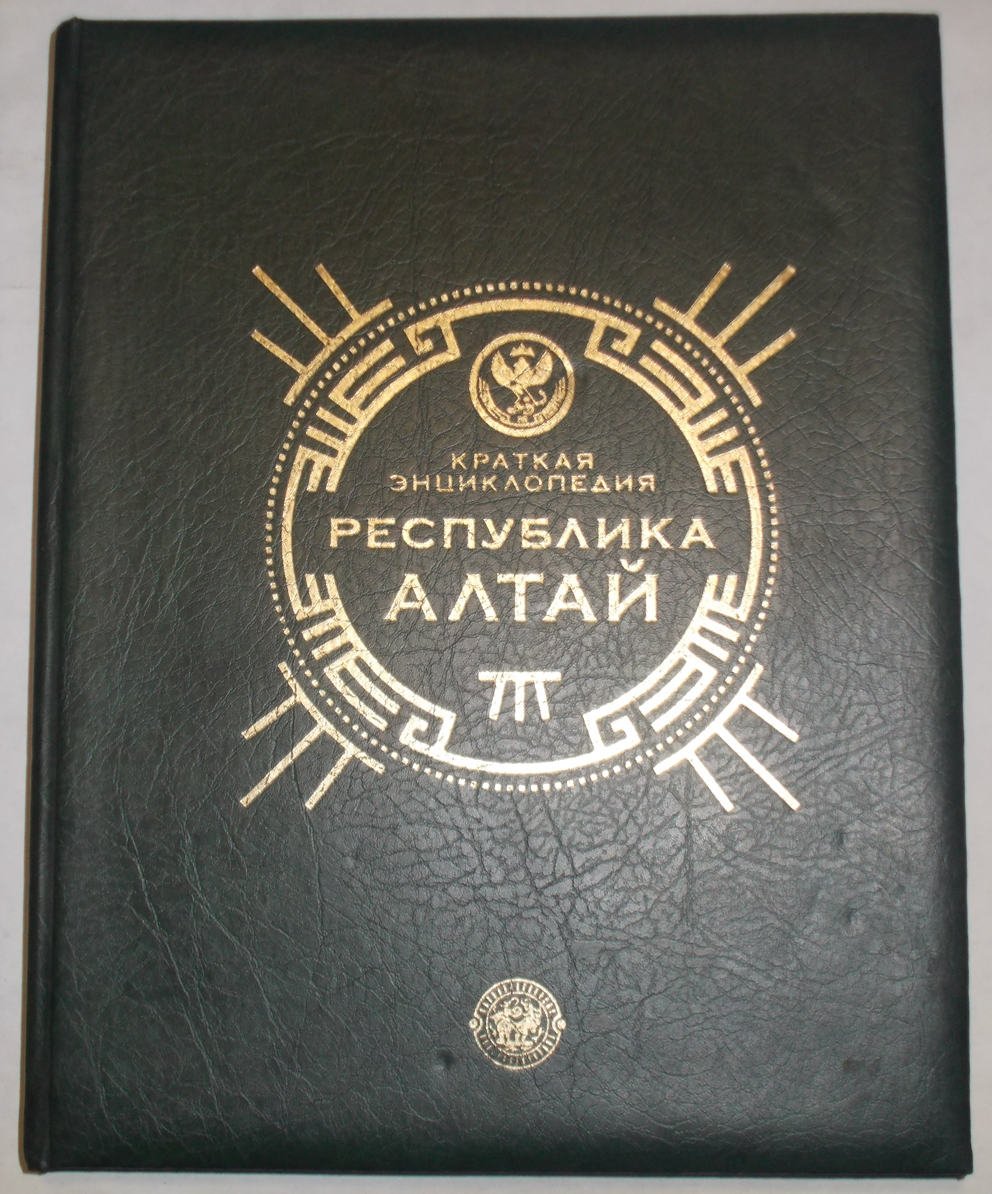 Обложка Краткой энциклопедии Республики Алтай